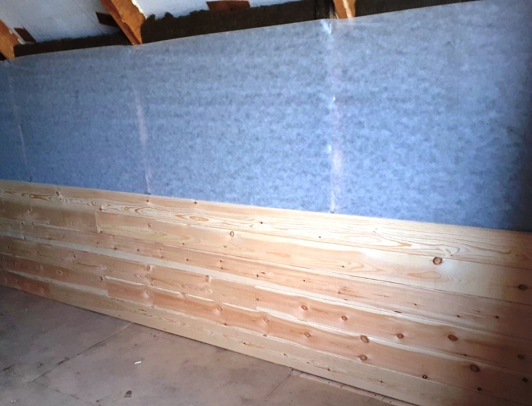 Calm Profile.